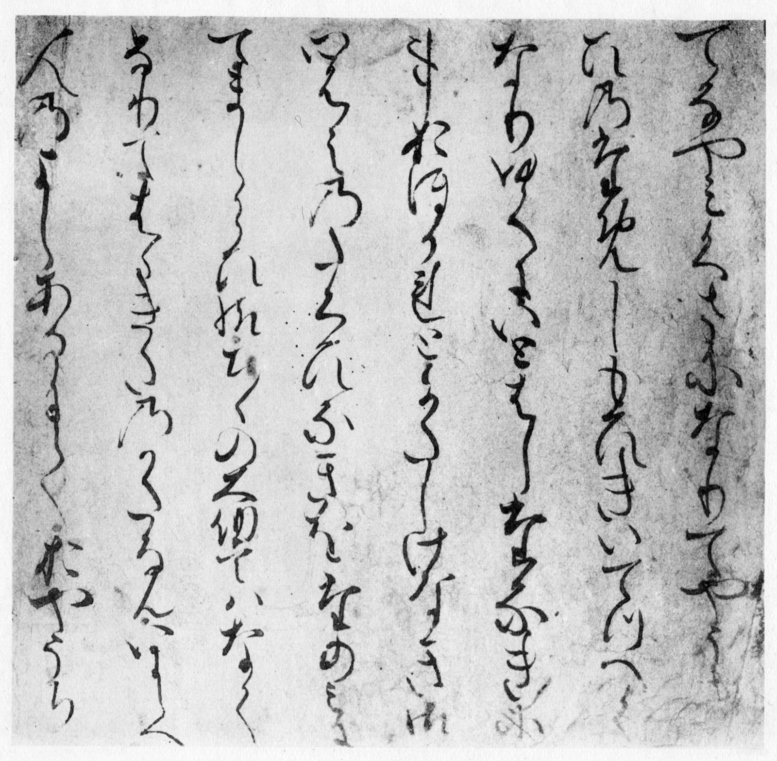 平瀬本桐壷巻写真。『定本源氏物語新解』上巻口絵より。